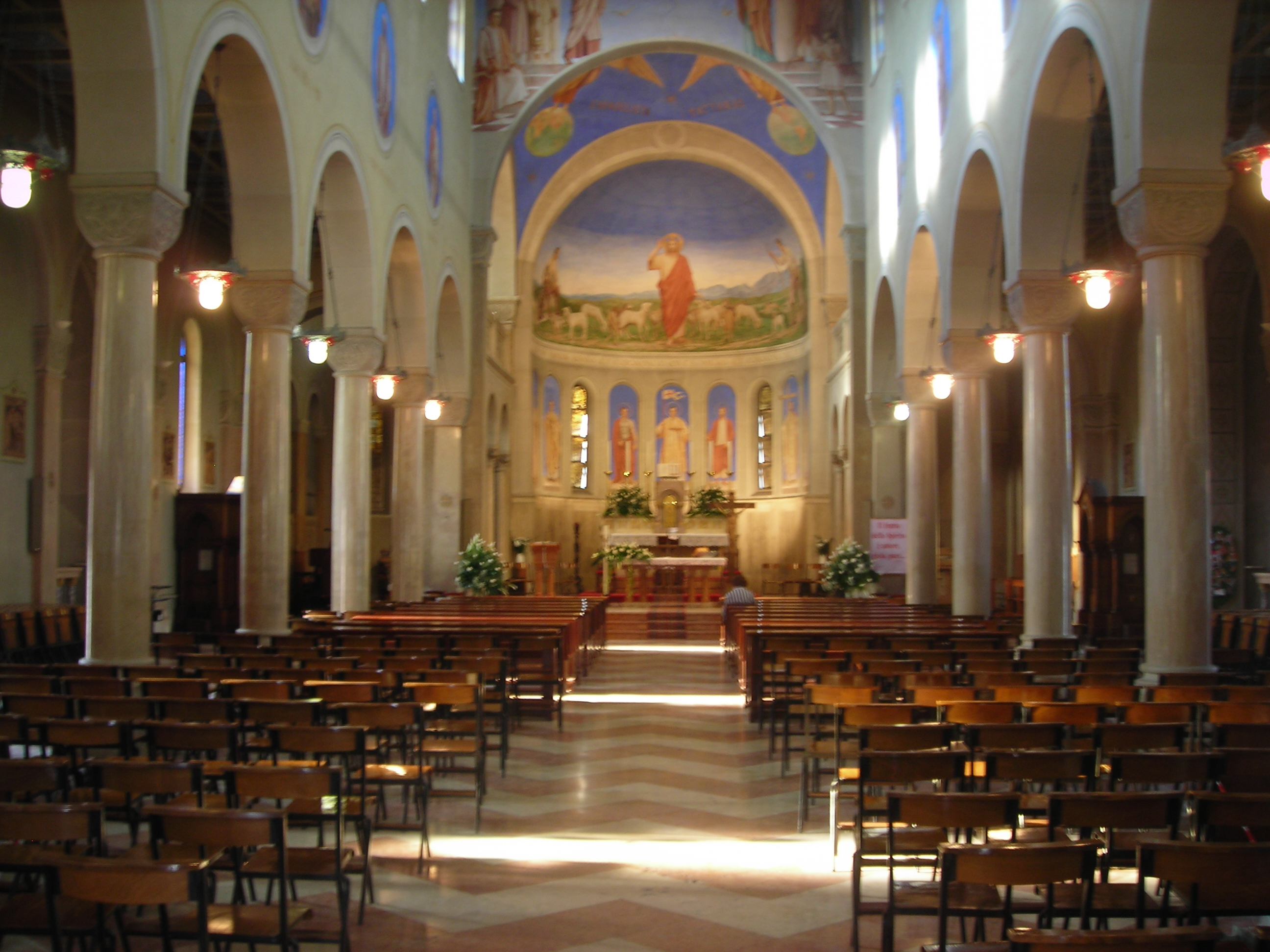 Interno della chiesa di Santa Maria a Bolzano Vicentino in provincia di Vicenza